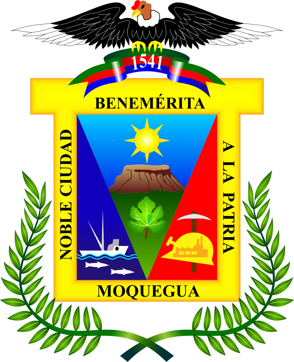 Distrito Moquegua - Provincia Mariscal Nieto - Región Moquegua